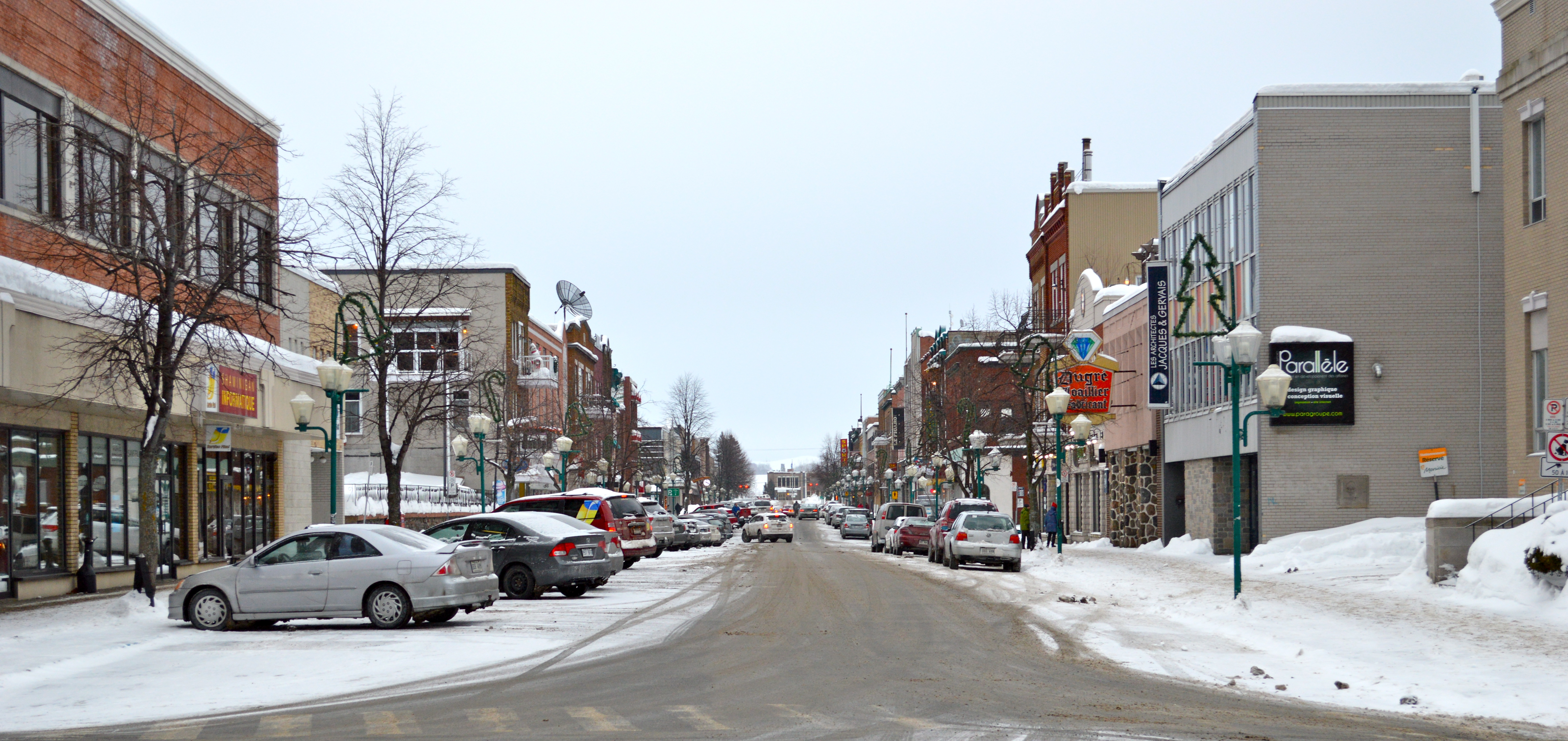 La 5e rue, vue de l'avenue Station, à Shawinigan (Québec).